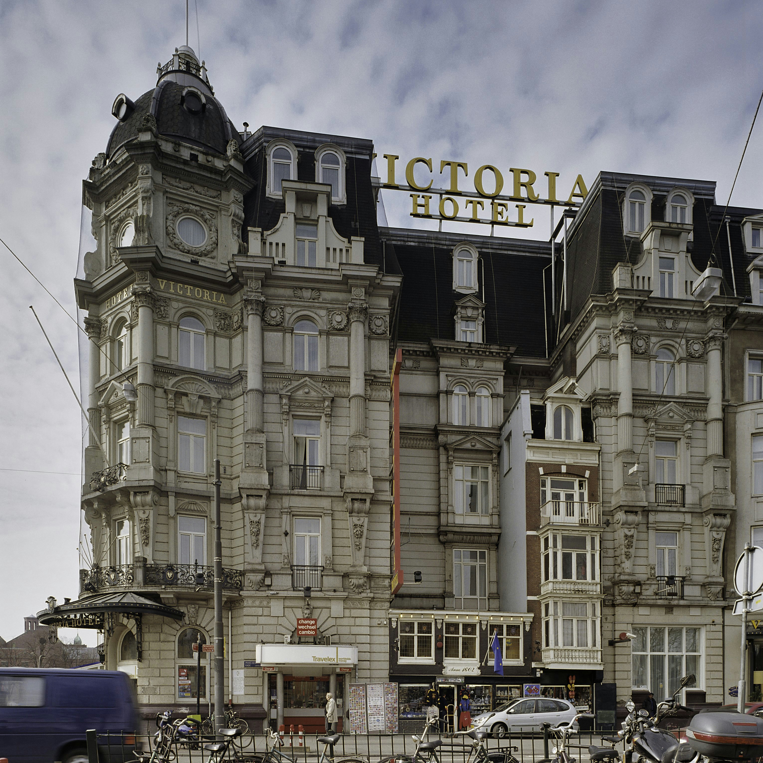 Victoriahotel: Met natuursteen beklede gevels en een hoektoren met koepel (opmerking: Gefotografeerd voor Monumenten In Nederland Noord-Holland)